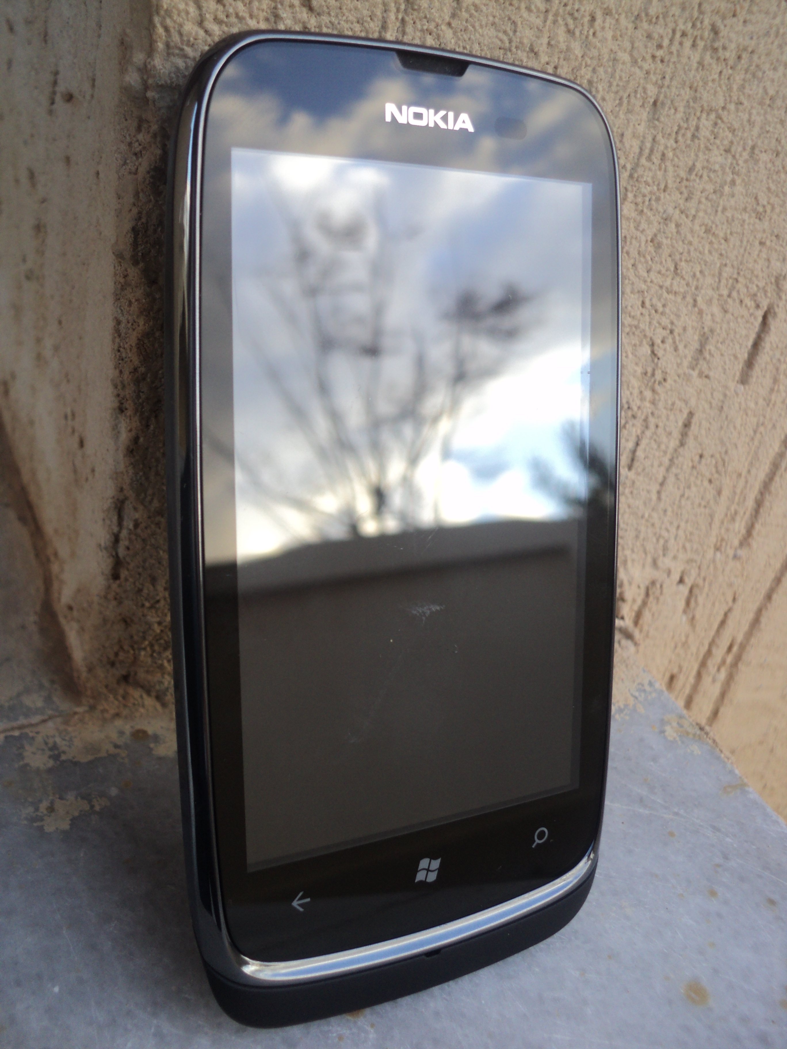 Nokia Lumia 610 mobile phone.